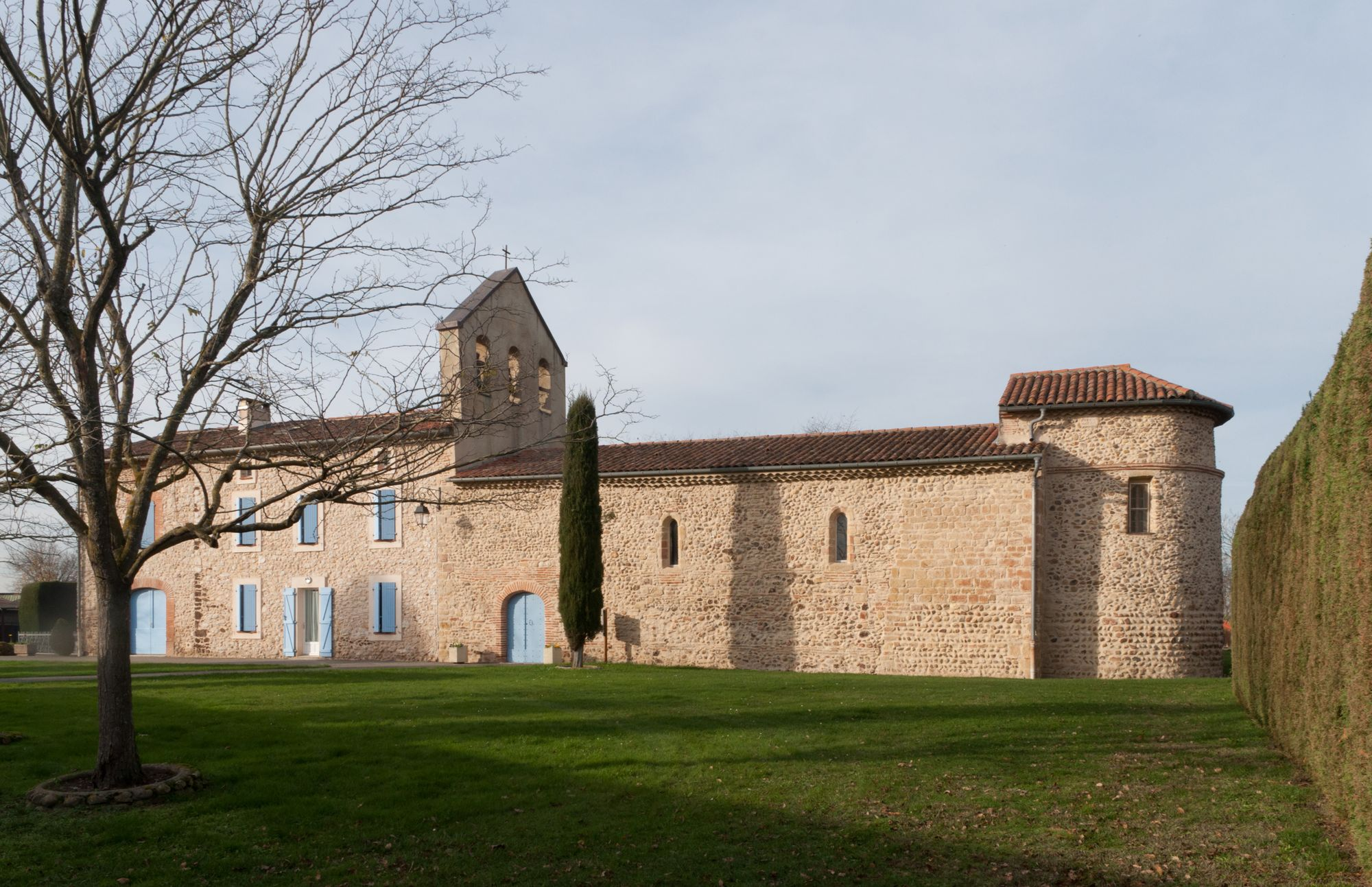 Eglise Saint-Saturnin du Carlaret - arrondissement de Pamiers (France)